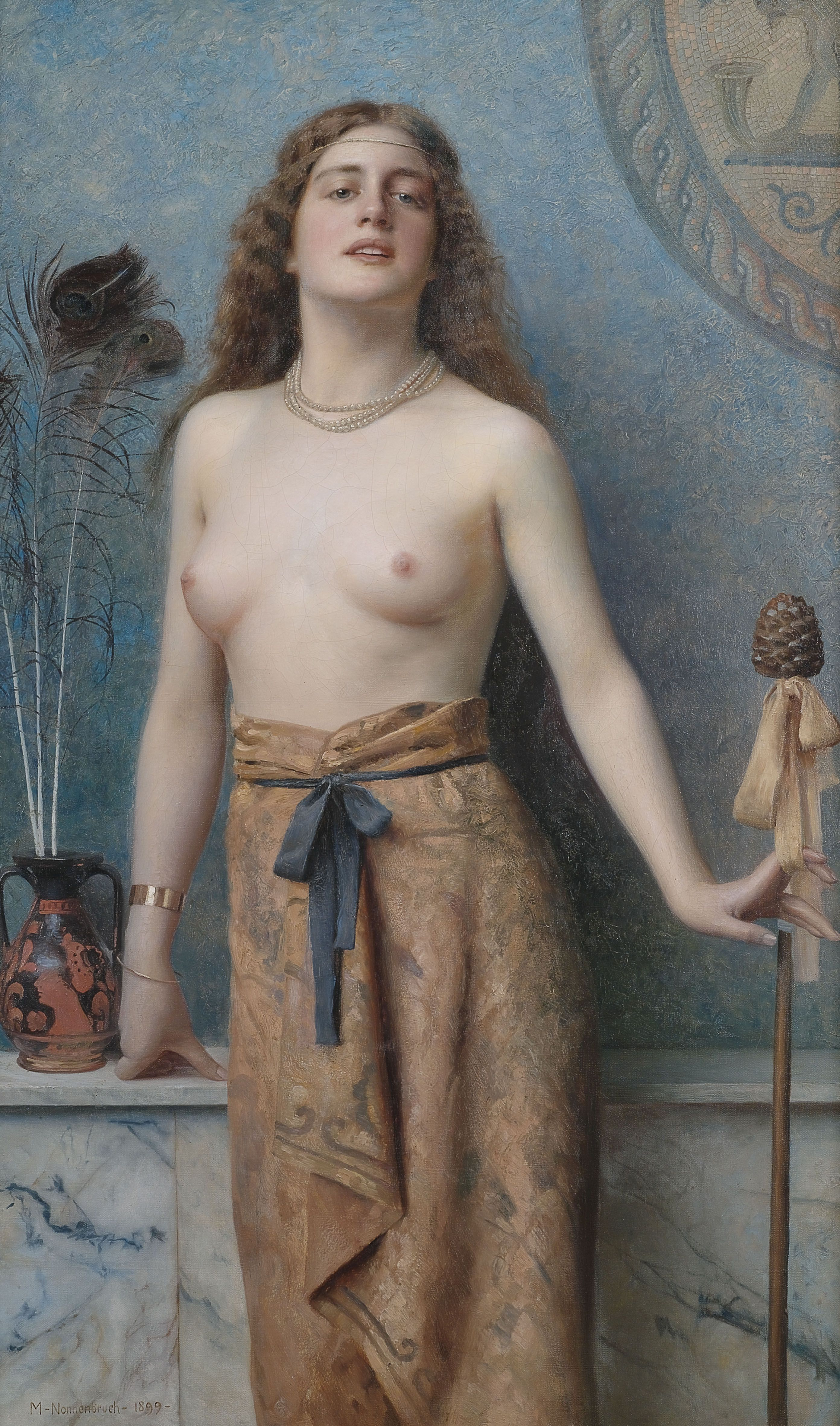 Junge Bacchantin von Max Nonnenbruch (Öl auf Leinwand, 130 x 79 cm), 1899